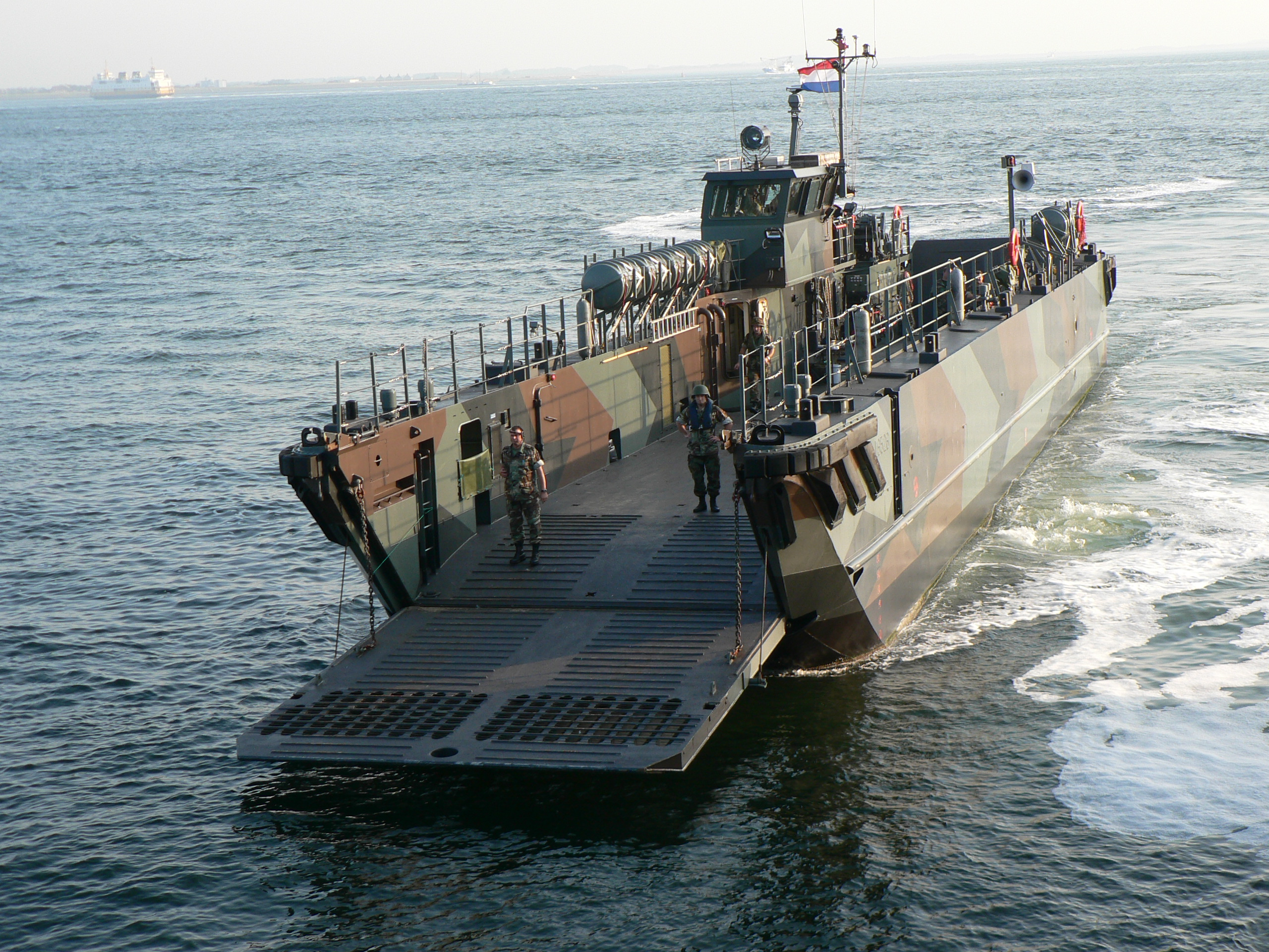 NLLCU Mk2